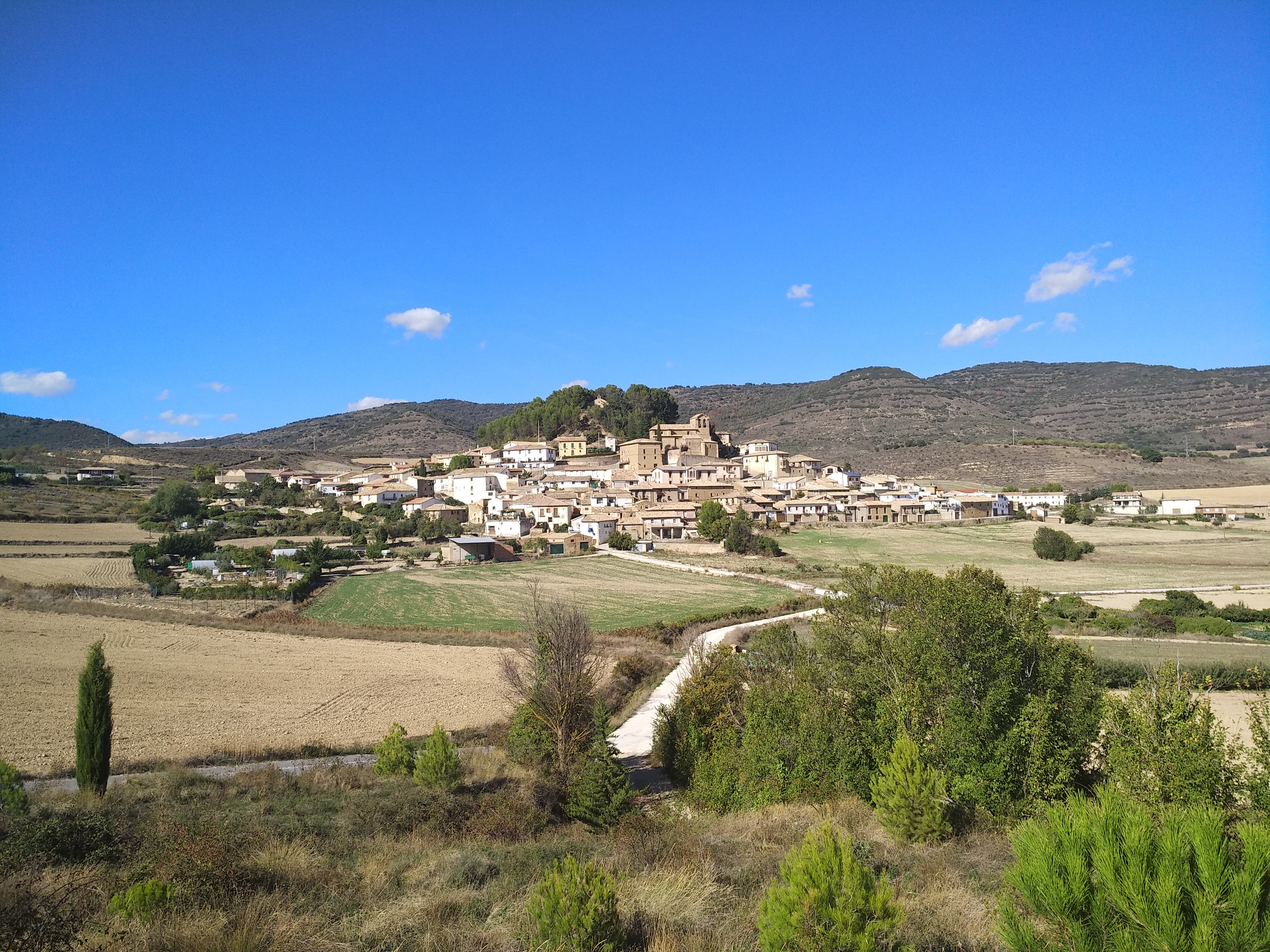 Eslava